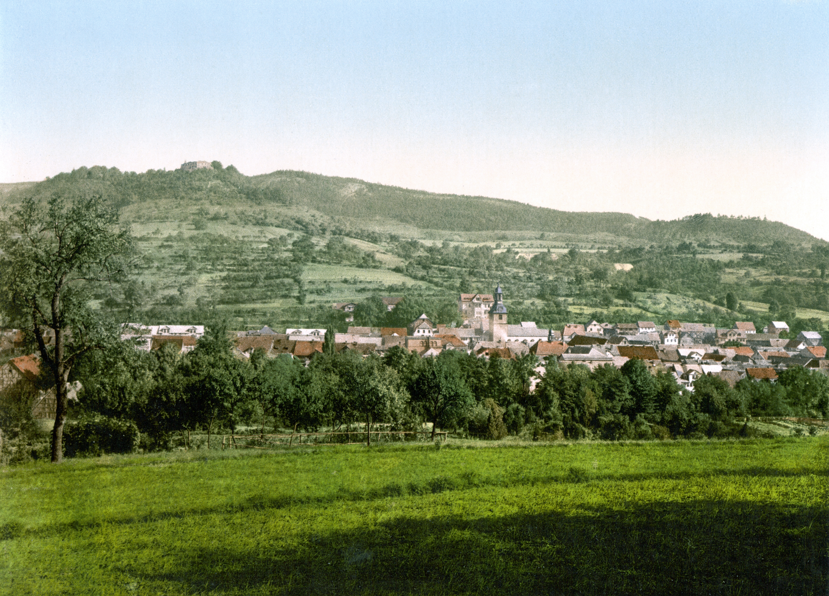 Blankenburg und Burg Greifenstein um 1900